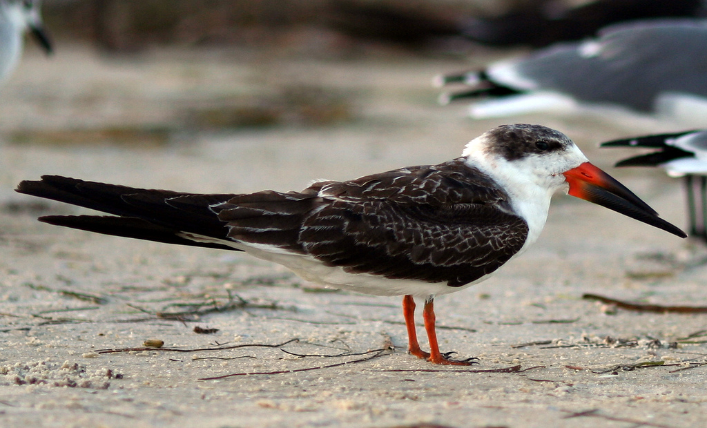 immature Rynchops niger